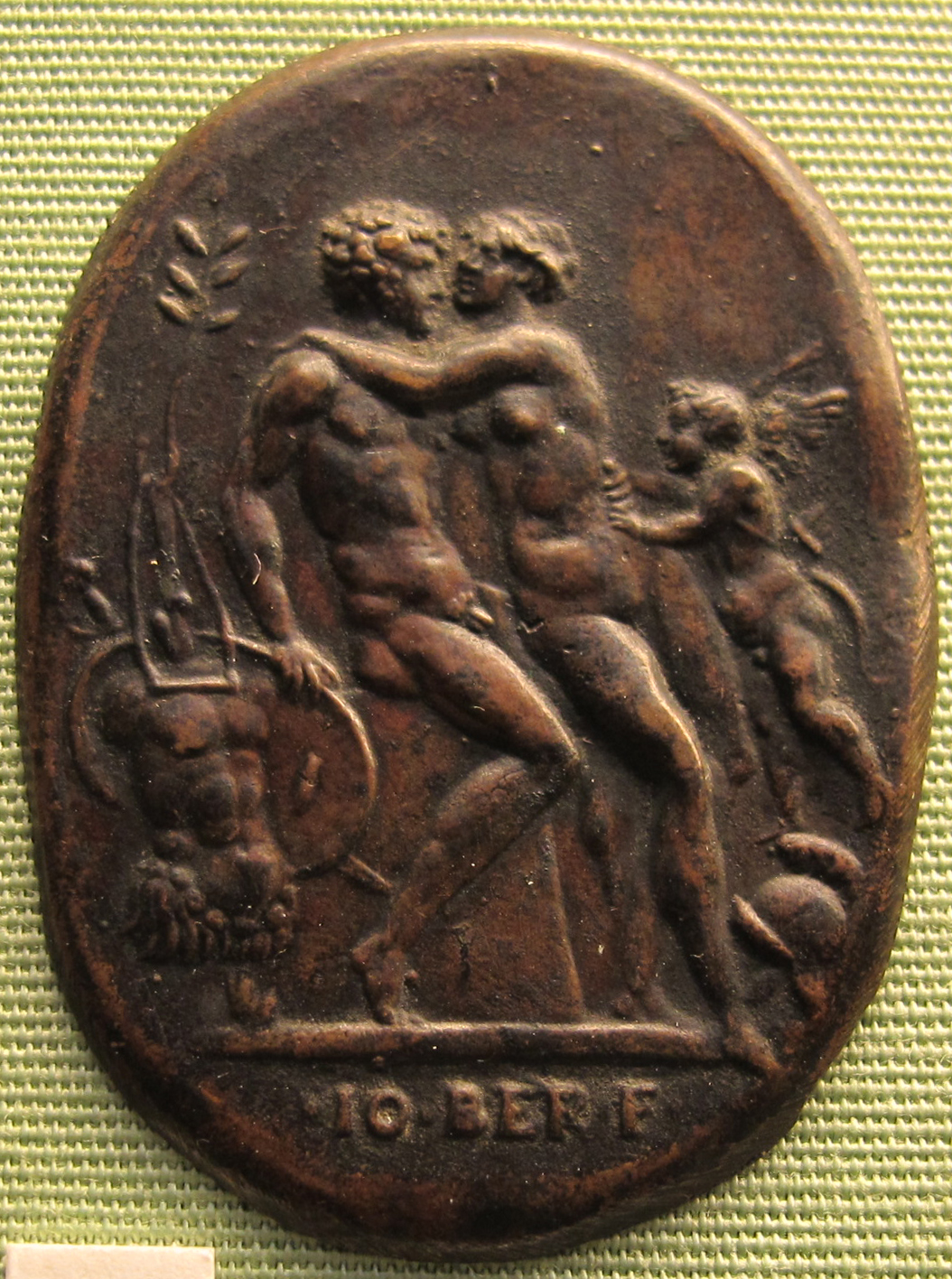 Giovanni bernardi, marte e venere, xvi sec